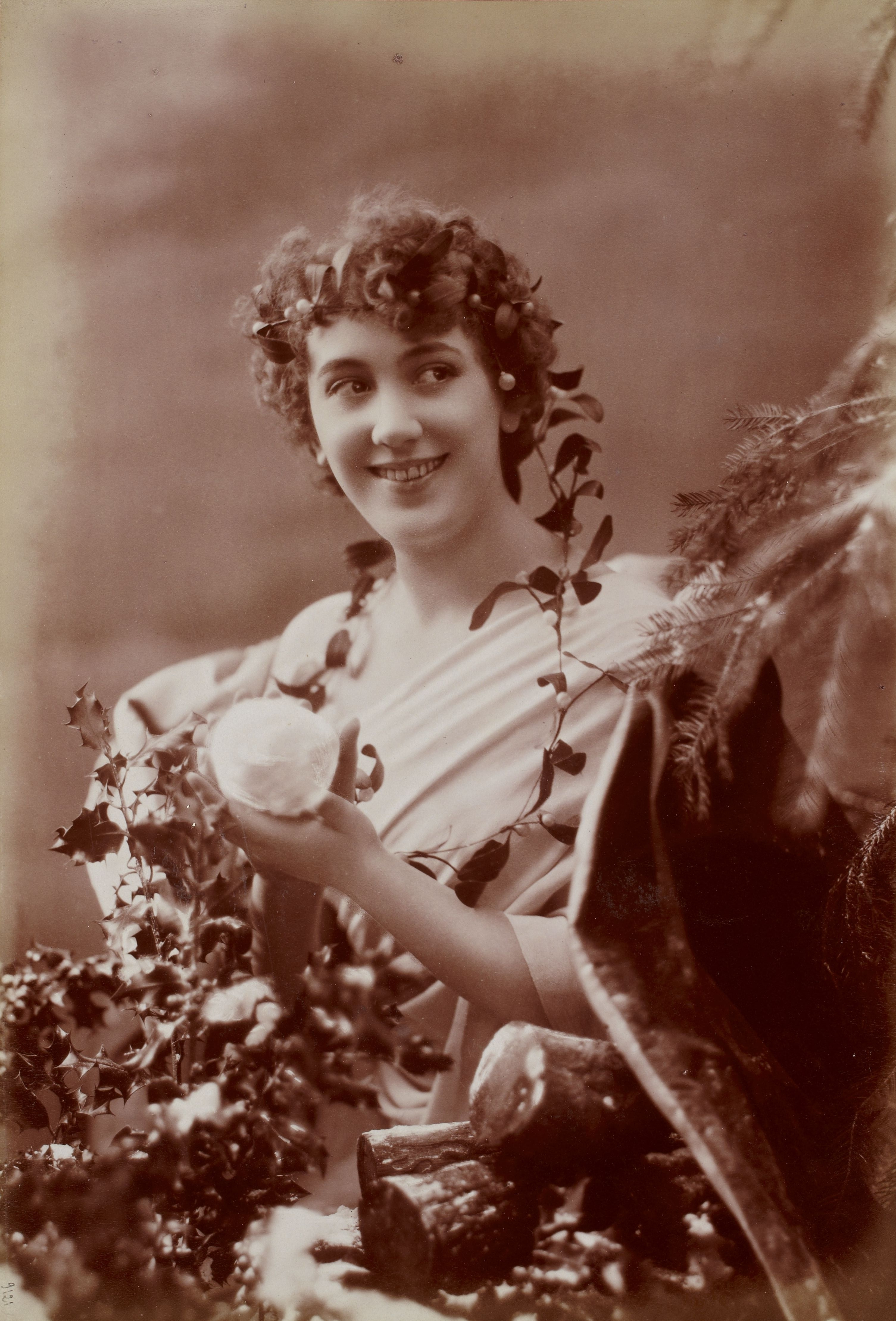 Album Reutlinger de portraits divers, vol. 47 : [photographie positive] : Aimée Campton.